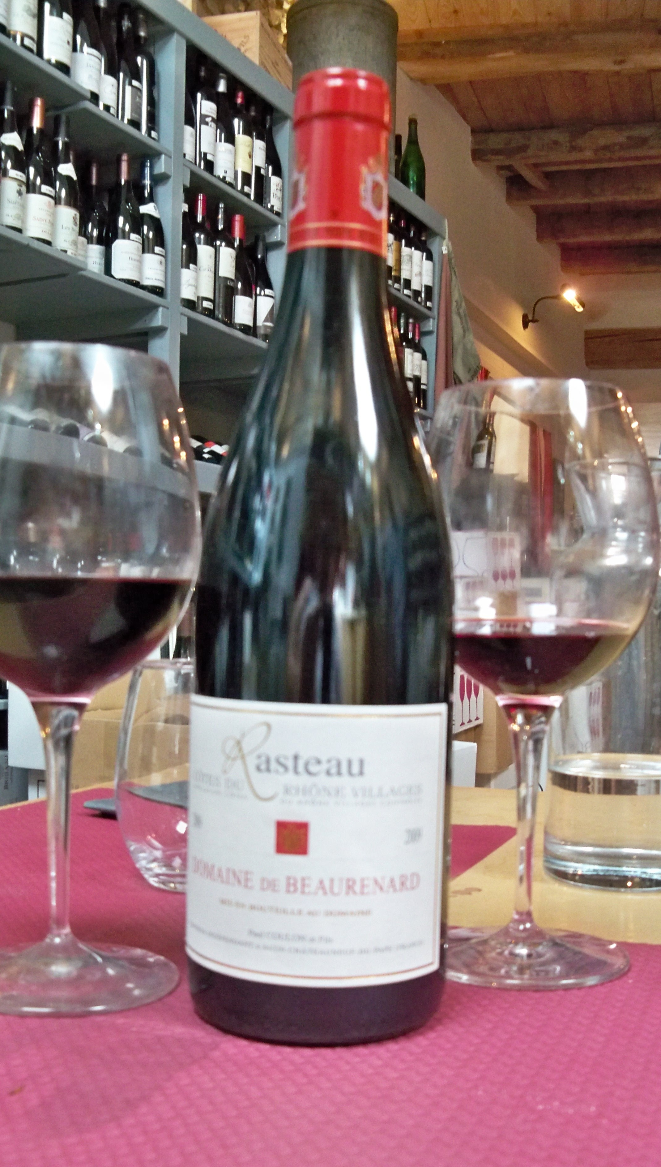 Vin de Rasteau